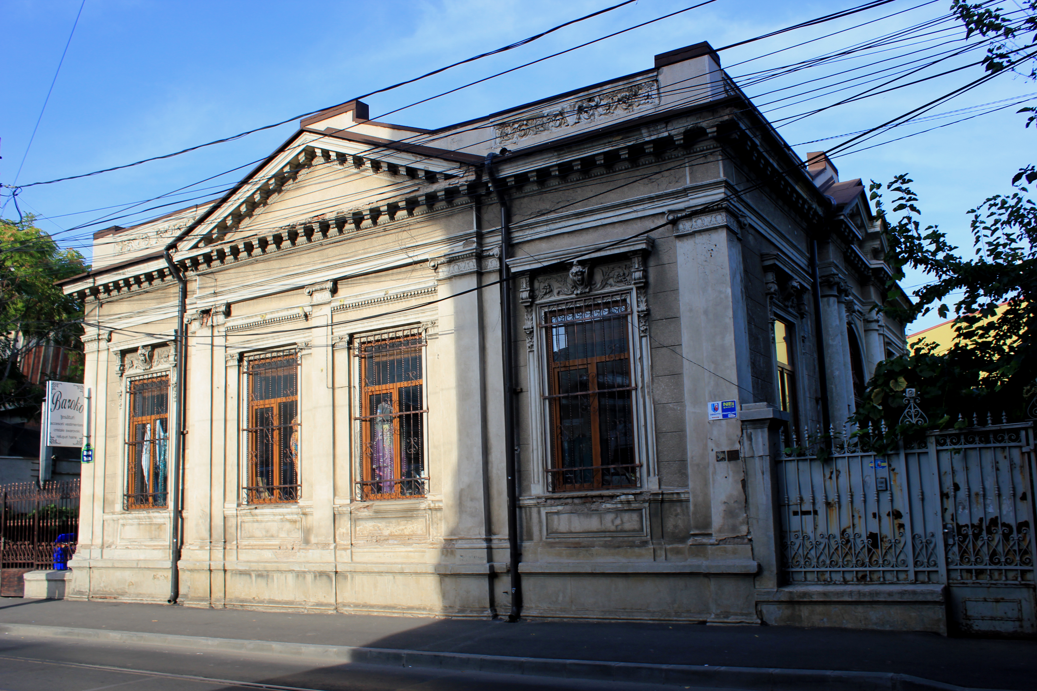 Casă Traian 198